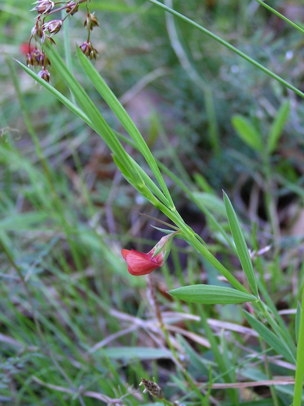 Aufgenommen am 22. April in Südtirol